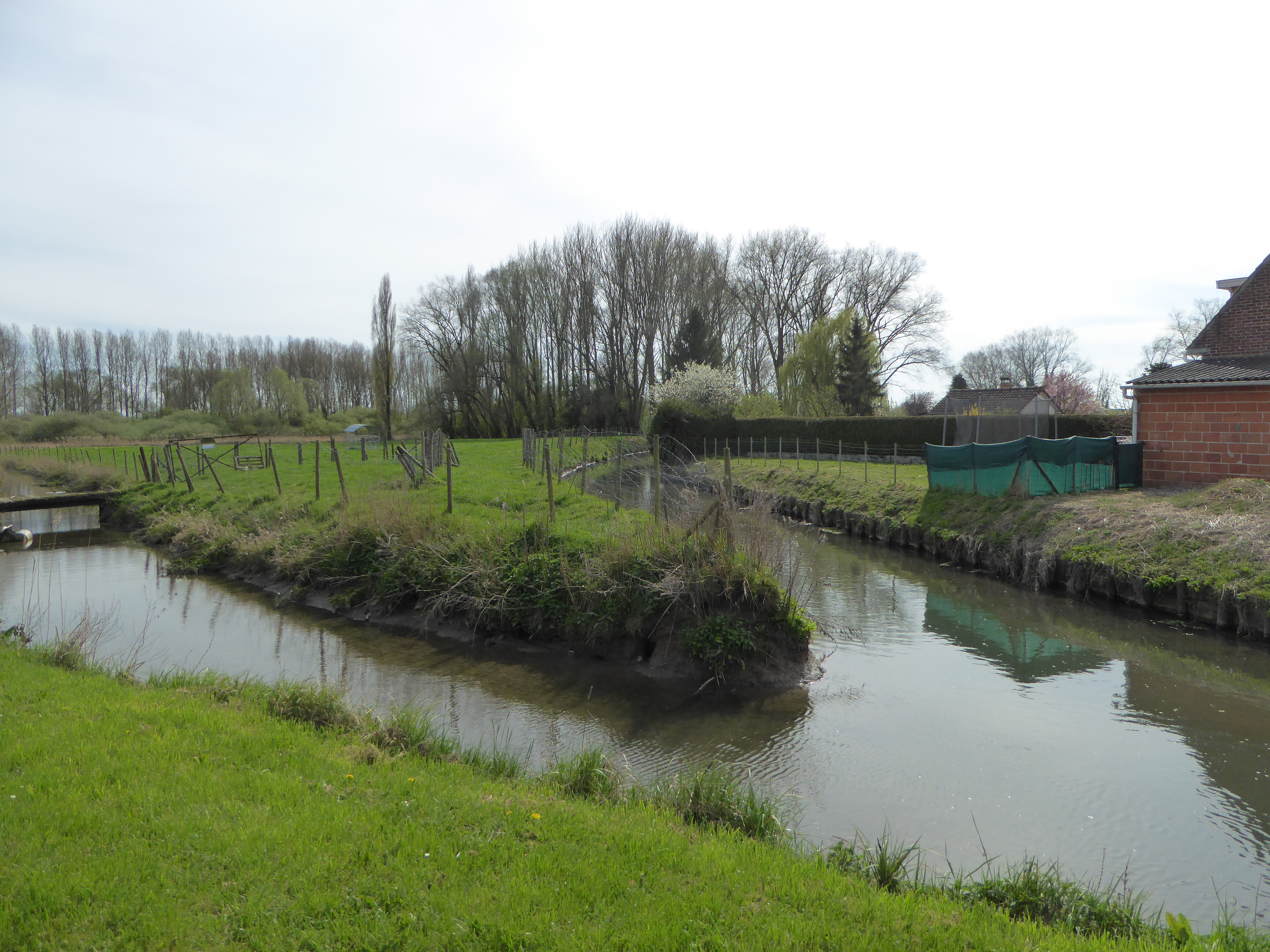 La rivière de Busnes, affluent de la Lys à Saint-Venant Pas-de-Calais.- France.